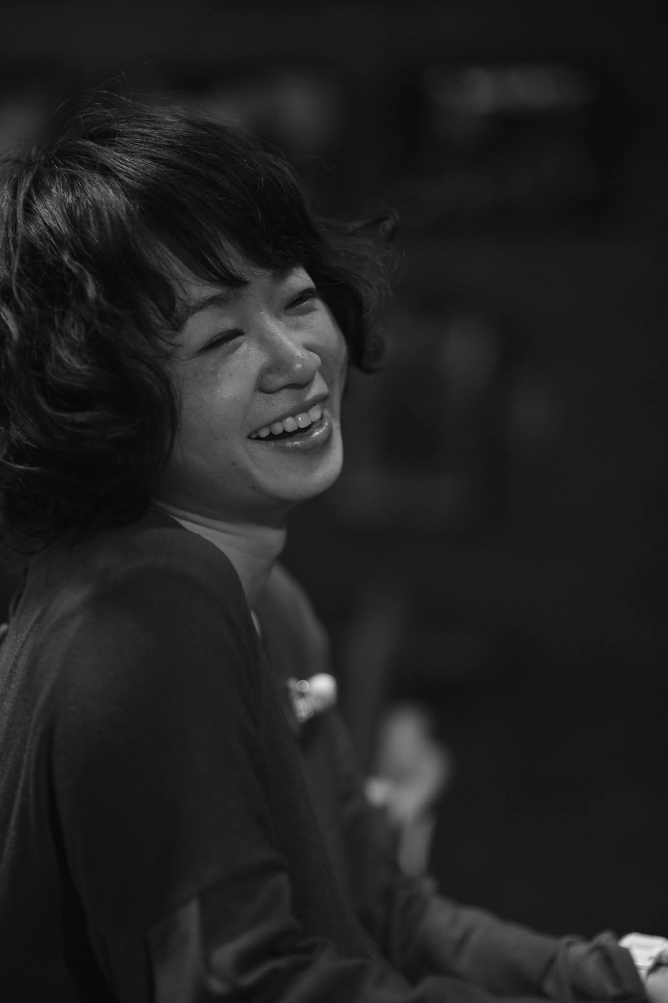 sachikodaita2015